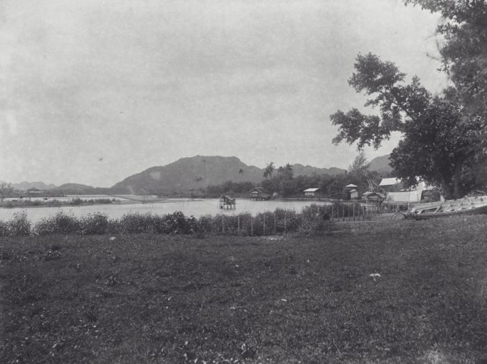 foto. Riviergezicht, Atjeh